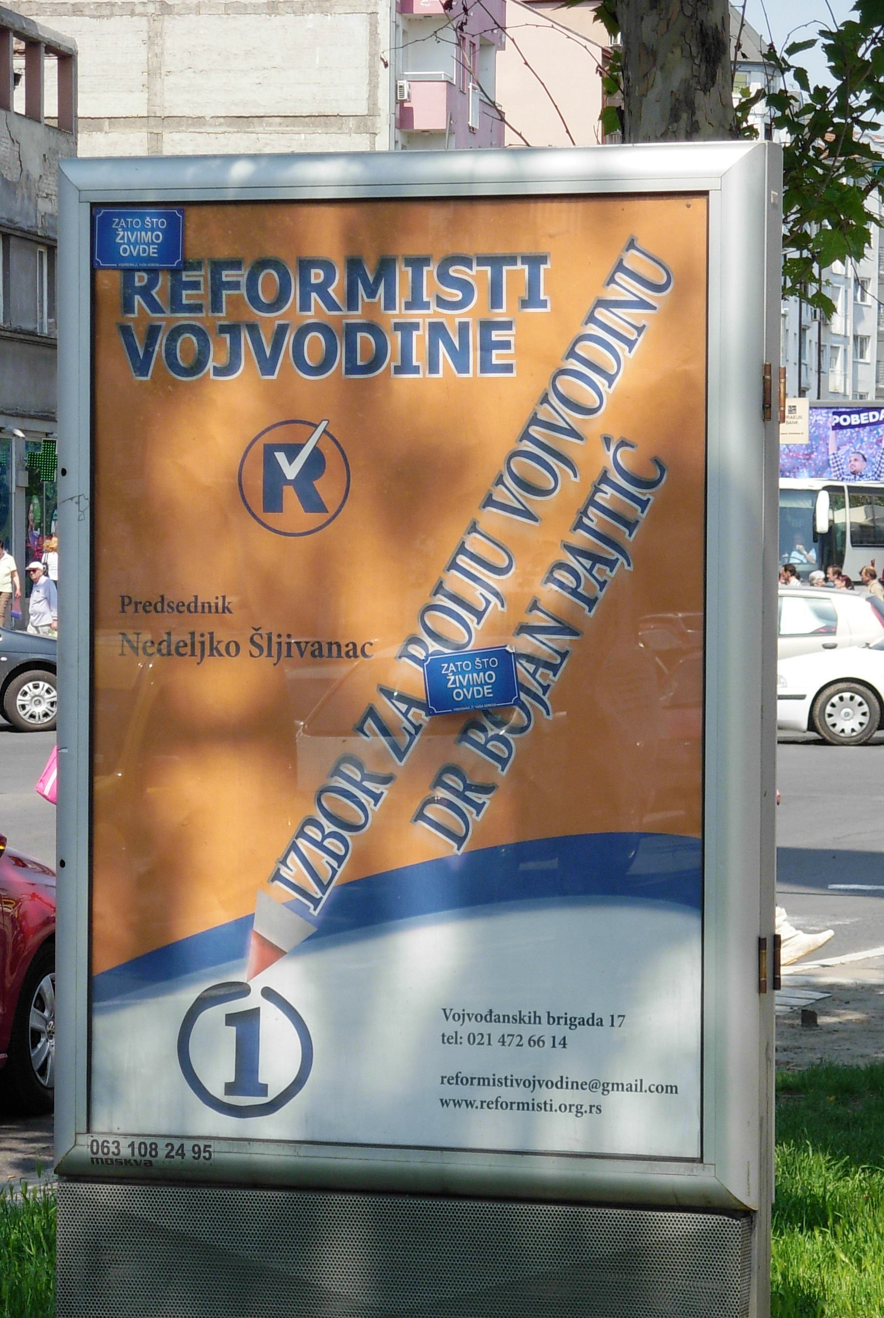 Pano - Reformisti Vojvodine, u Novom Sadu.